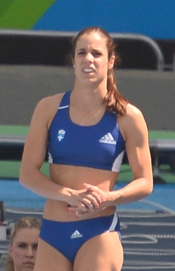 Ekateríni Stefanídi dans sa qualification au saut à la perche aux JO de Rio 2016